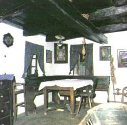 Heimathaus